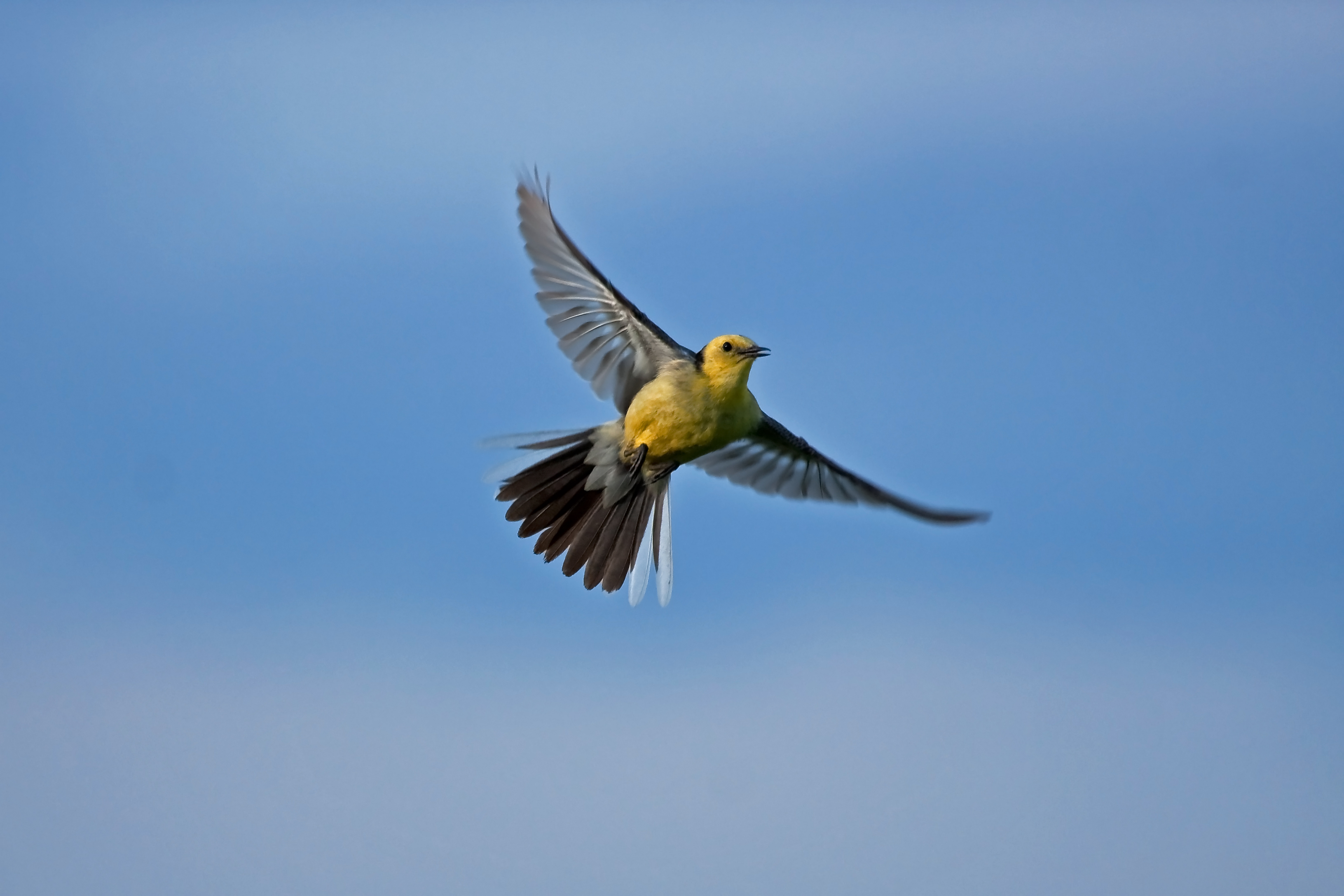 Желтоголовая трясогузка в полёте.